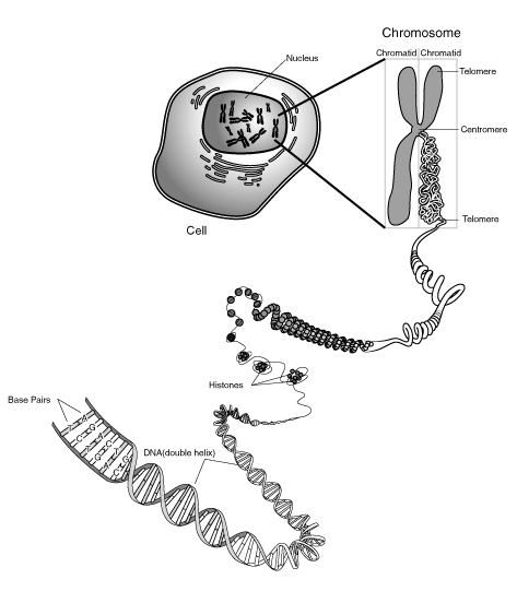 Organisation de l'ADN en chromosome